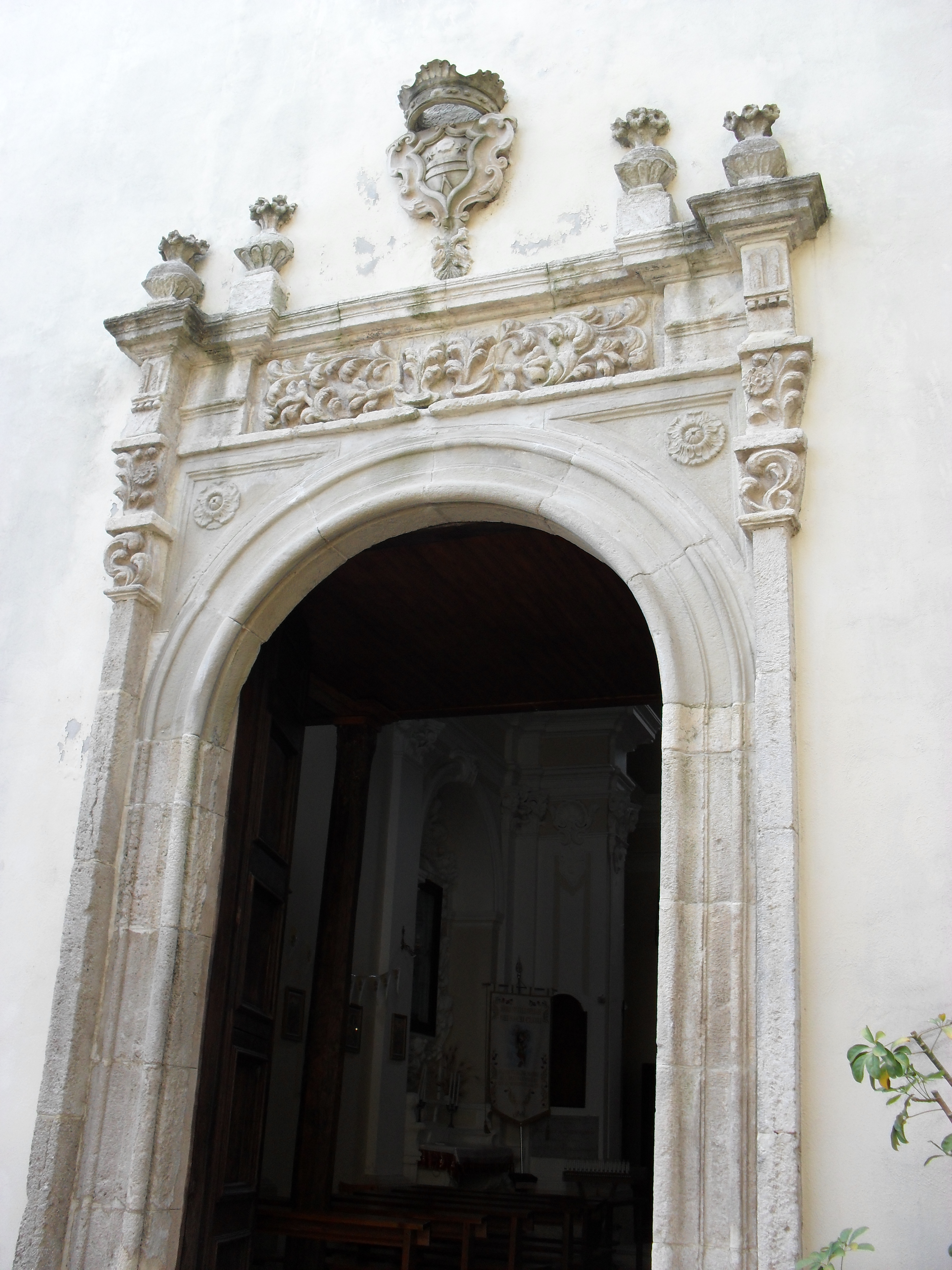 Portale in tufo della Chiesa intitolata alla Madonna del Buon Consiglio presso San Benedetto Ullano (CS)